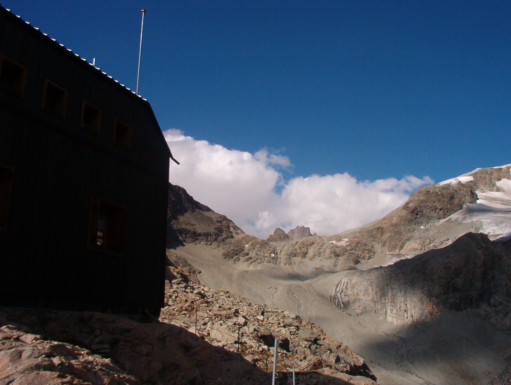 Il Colle Collon visto dal Rifugio Nacamuli al Col Collon - Alpi Pennine